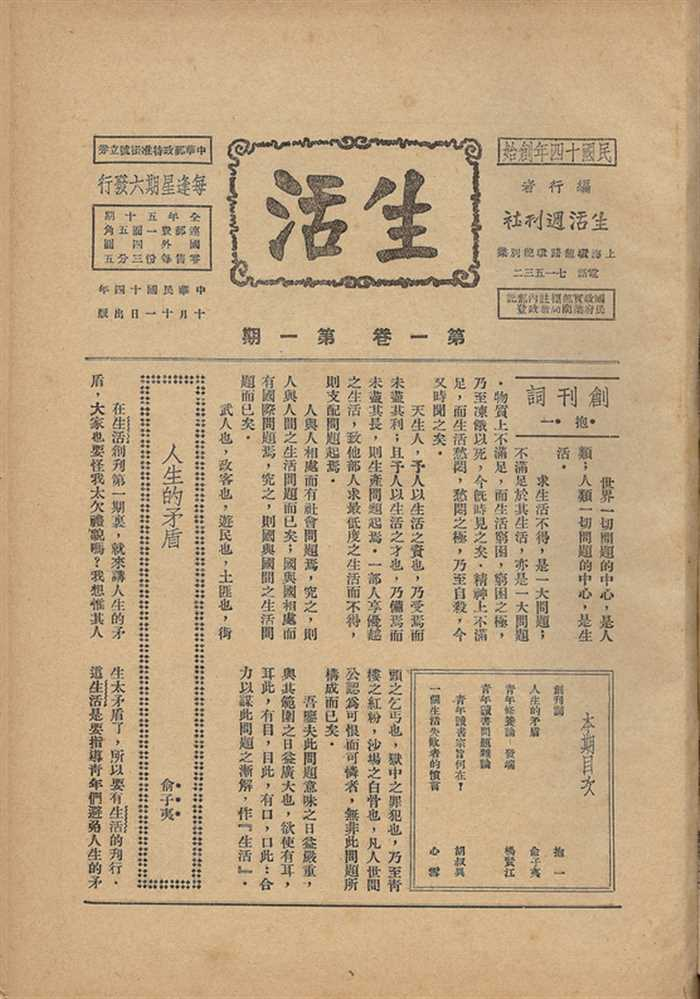 《生活》第一卷第一期，1925年10月11日